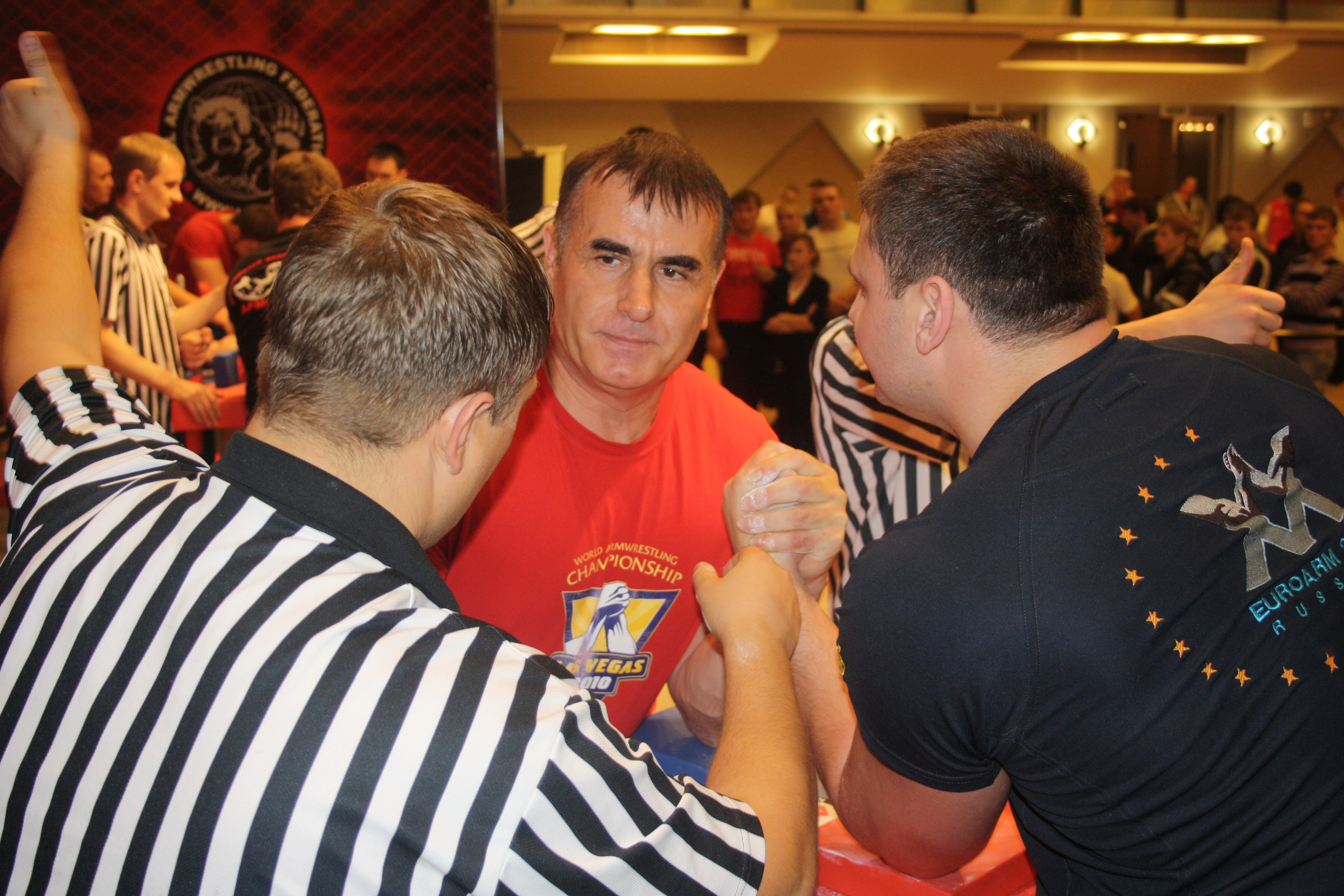 Золотой тигр 2011